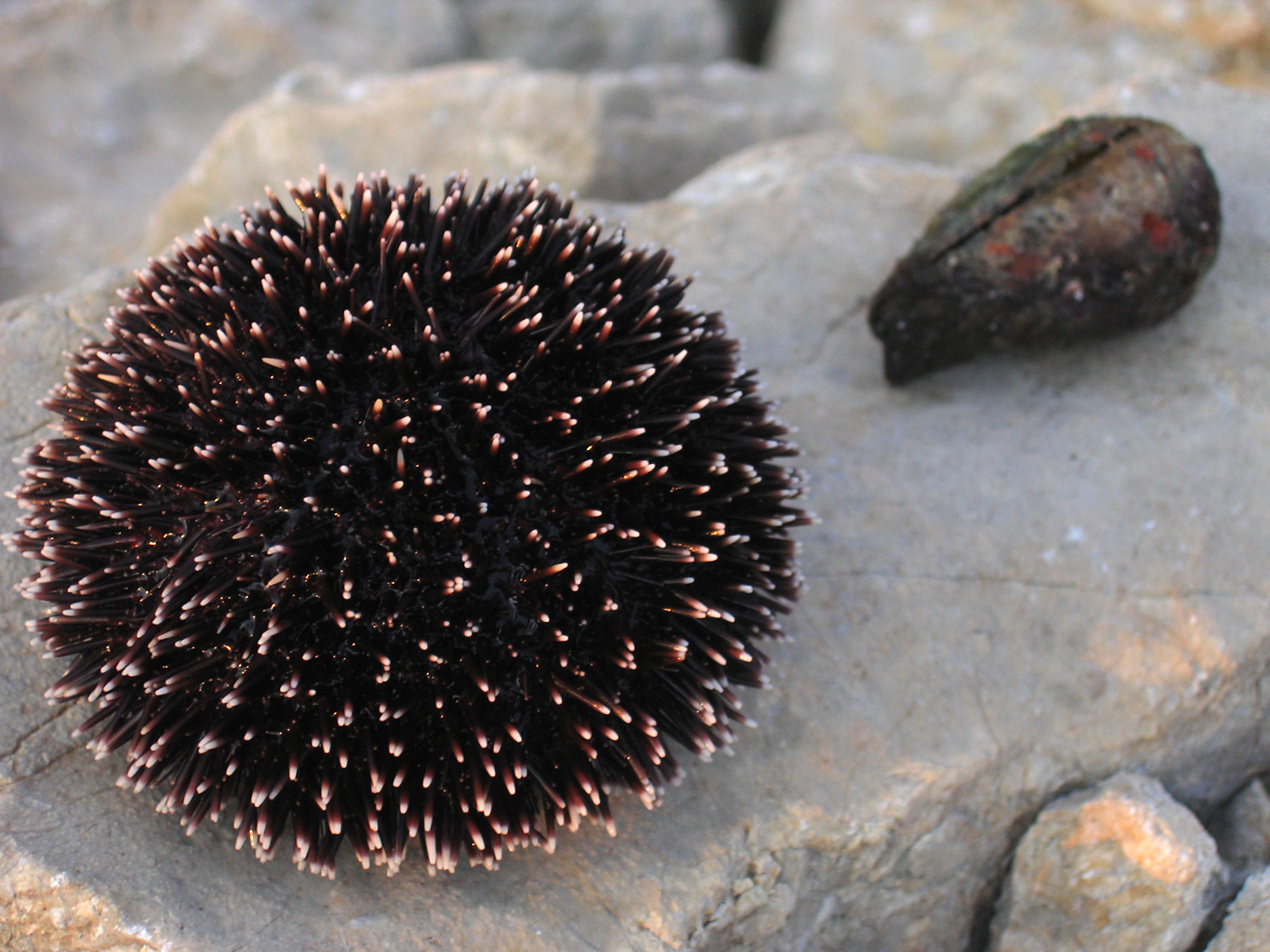 Sphaeraechinus granularis e Arca noae